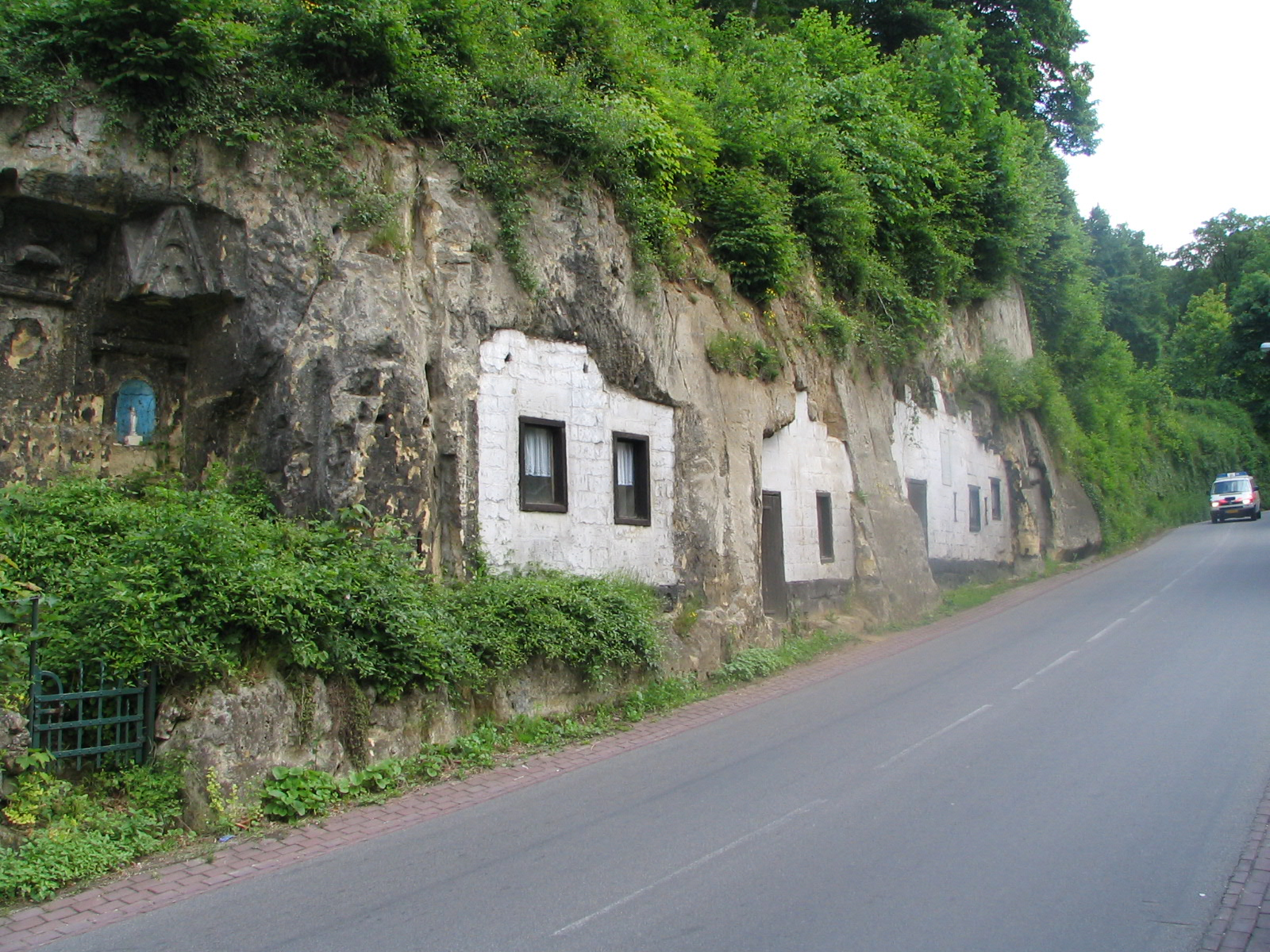 Rotswoningen bij Geulhem (gemeente Valkenburg a/d Geul)